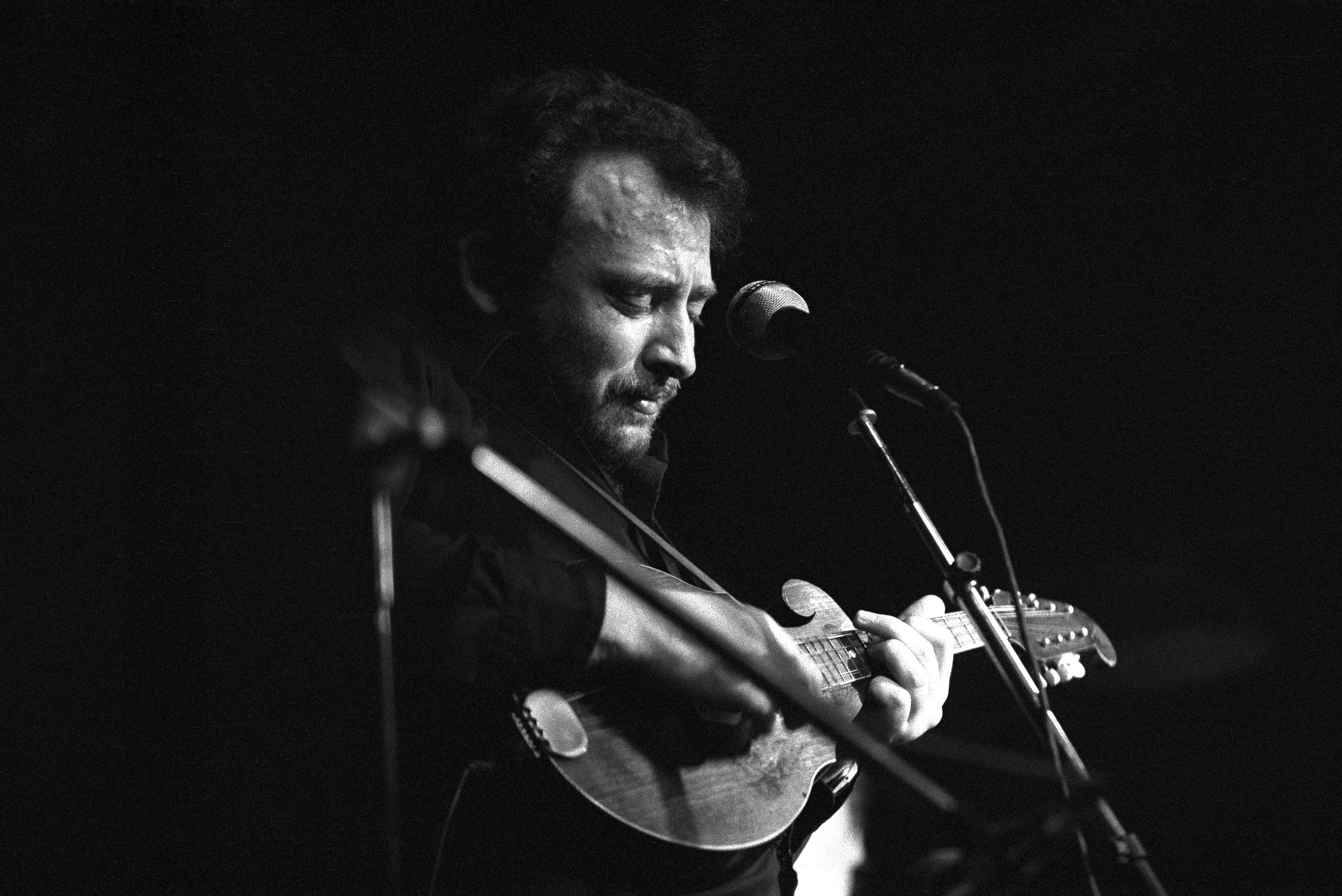 Michael Chapman beim Auftritt mit Chris Farlowe und Alexis Korner in der Hamburger "Fabrik" November 1979